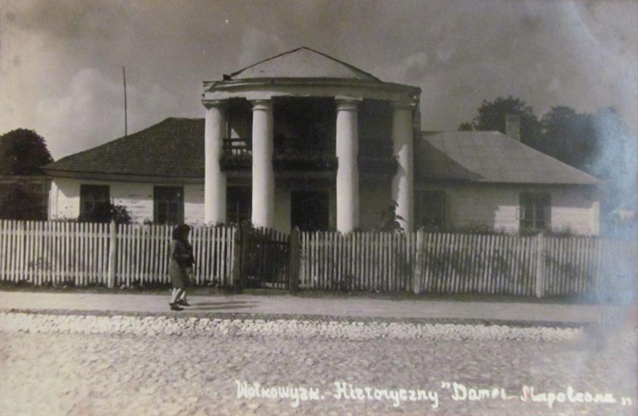 Беларуская (тарашкевіца): Ваўкавыск (Vaŭkavysk), вуліца Шляхецкая (vulica Šlachieckaja). Дом Напалеона